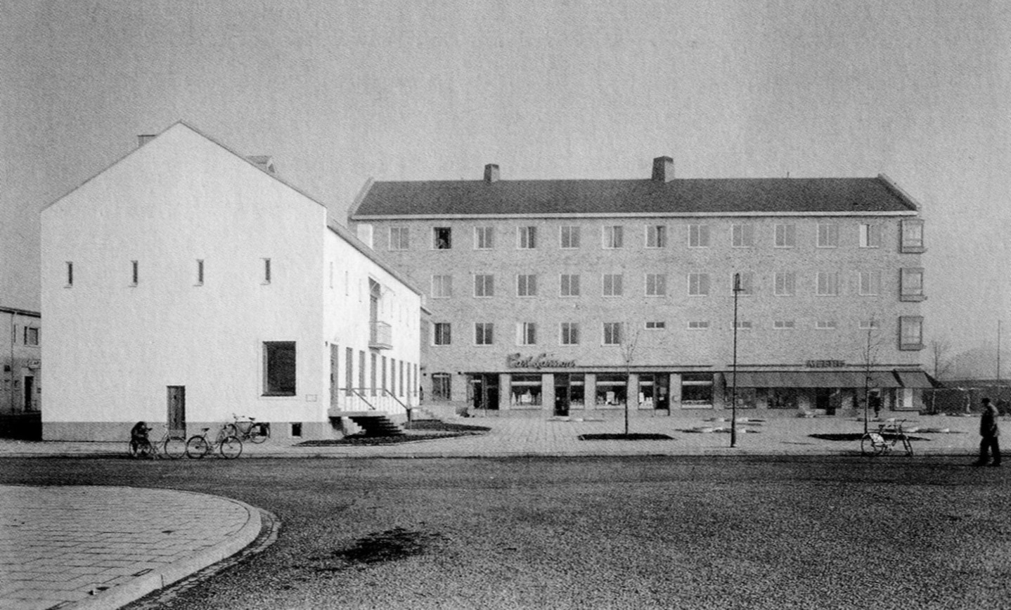 Midsommargården omkring 1946